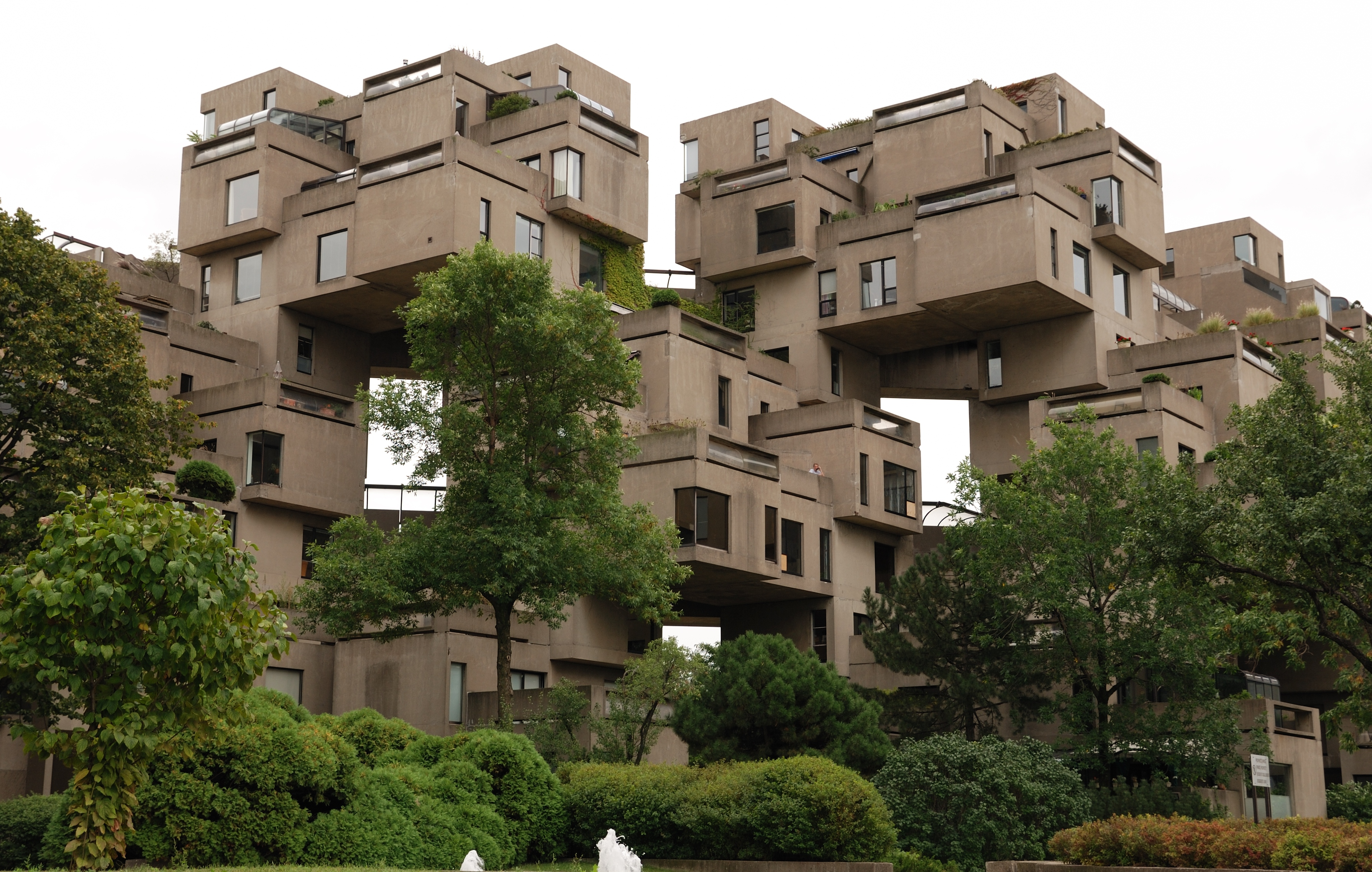 Montreal: Habitat67